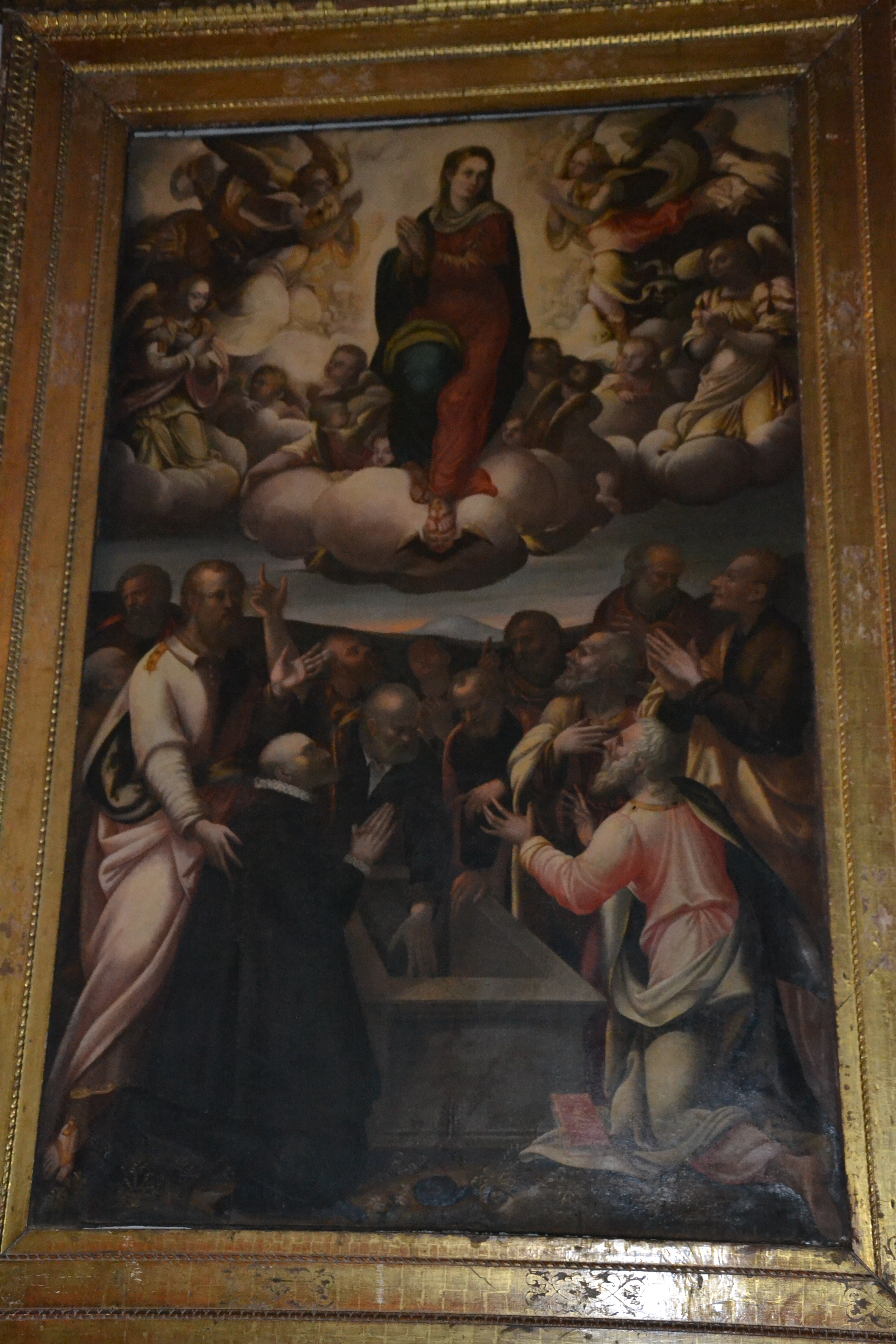 Chiesa di Santa Maria del Carmine (Pavia)